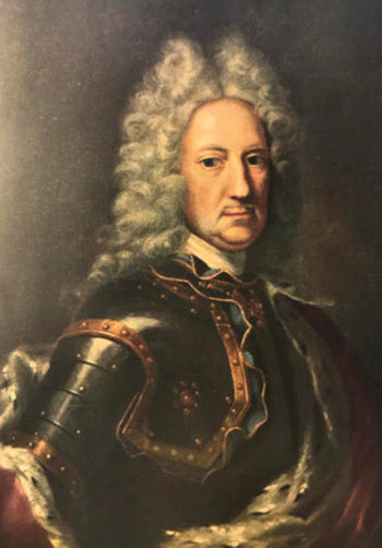 Oljemålning av Magnus Stenbock, utförd i Holstein 1712 av Johan David Schwartz.